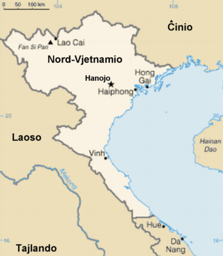 Mapo de Nord-Vjetnamio (1945 - 1976) Fonto: la jena mapo el la vikipedia komunejo